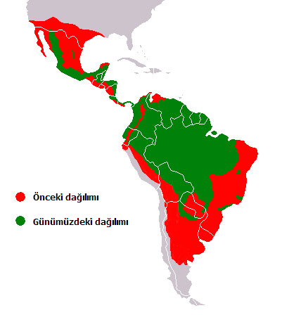 Commons'daki resmin Türkçeleştirilmiş hâli.